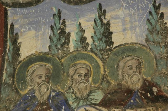 Фреска от Ошинския манастир, Егейска Македония, Гърция.